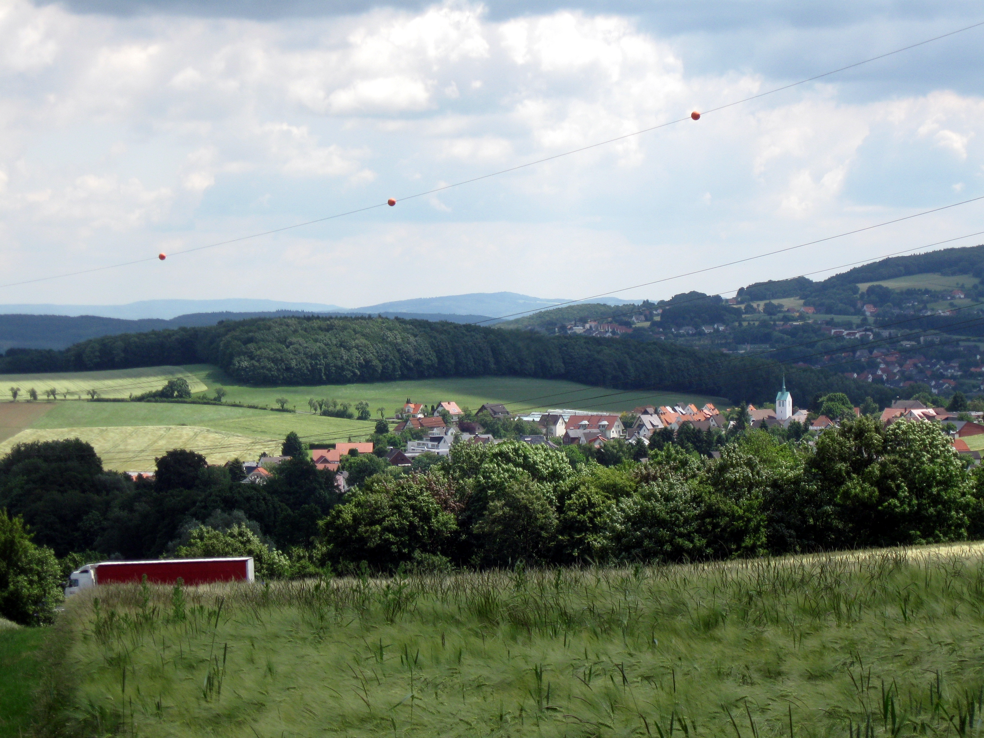 Ortschaft Bonneberg (im Vlothoer Stadtteil Valdorf) und Bonneberg in Vlotho, Kreis Herford, Nordrhein-Westfalen.